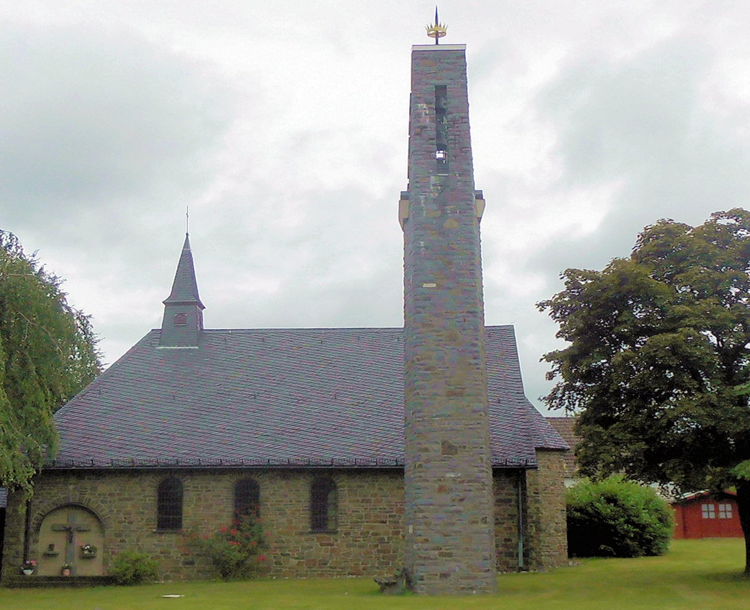 Kirche St. Maria im Frieden in Schönenbach, Stadt Waldbröl, Deutschland